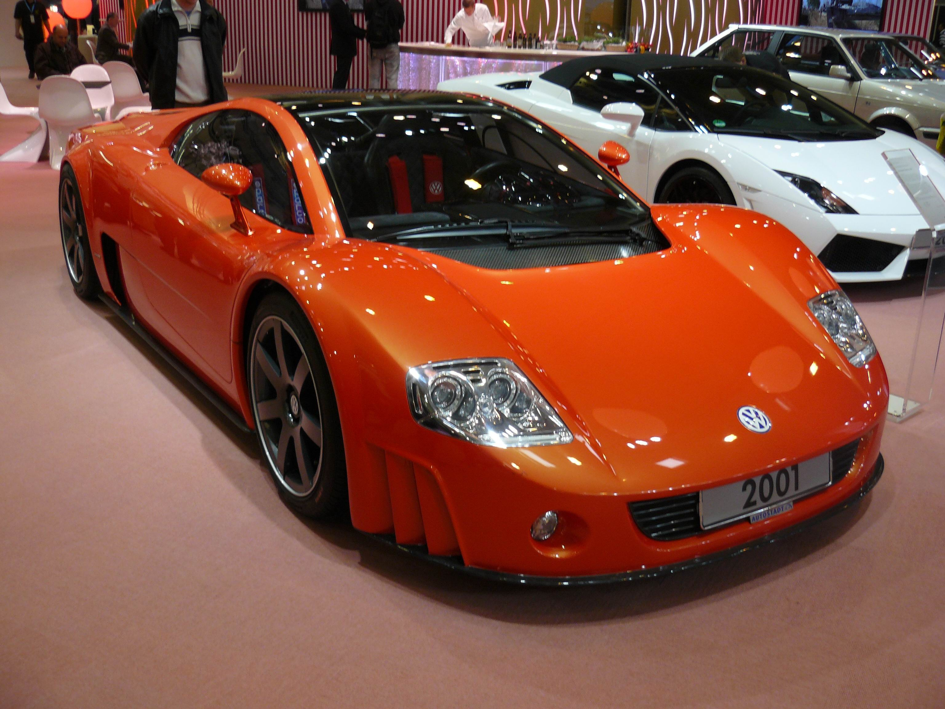 Essen 2011